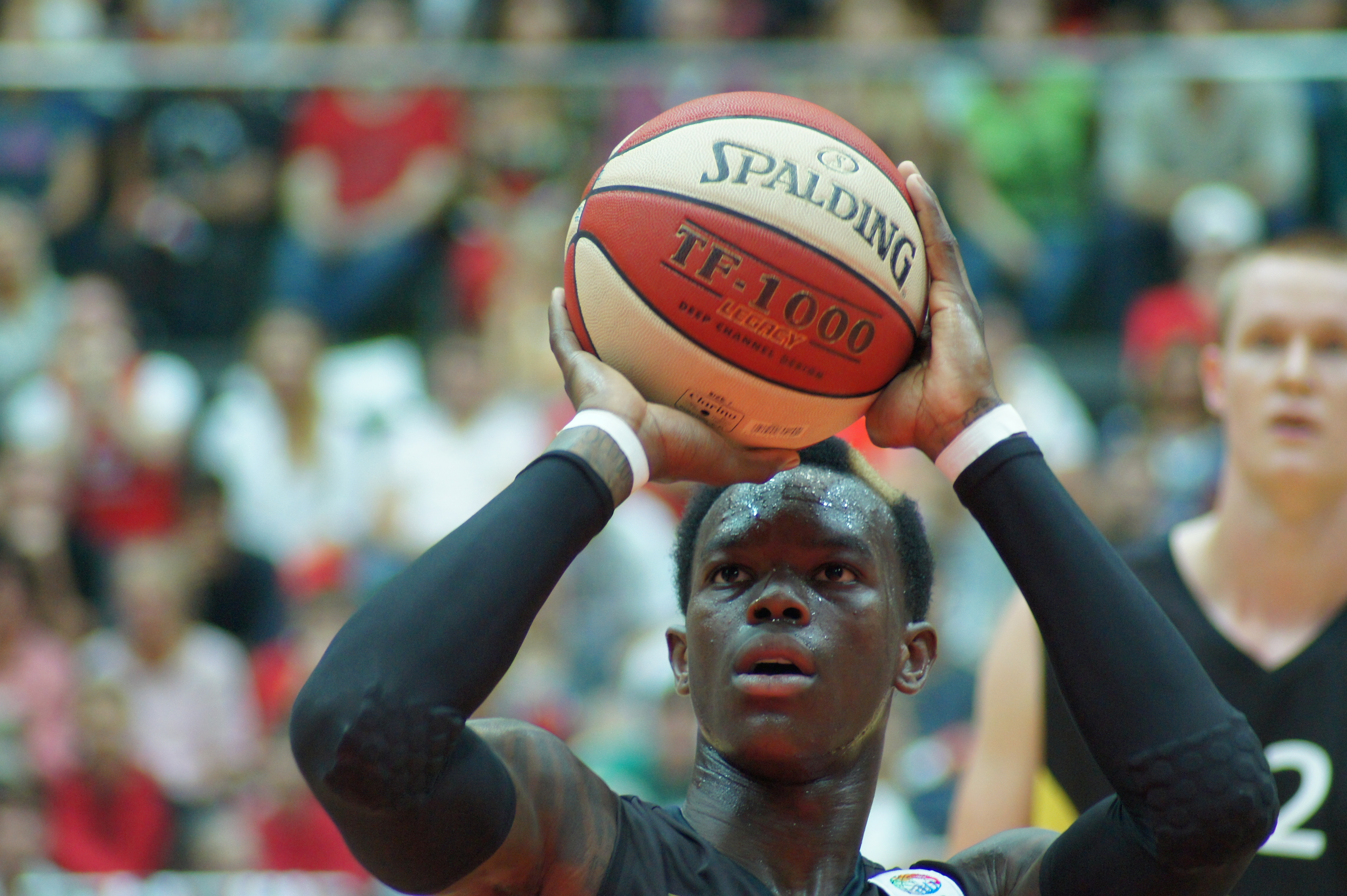 Qualifikationsspiel EuroBasket Österreich - Deutschland, 13. August 2014 im Multiversum Schwechat.